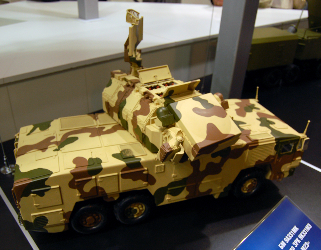 Макет ЗРК Тор-М2Э. Хорошо видна открытая боеукладка. МАКС-2009